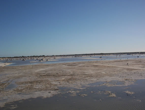 Extraccion de la sal en Manaure, La Guajira - Colombia